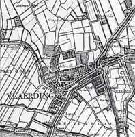 Vlaardingen(1712)Crucuis1a.jpg